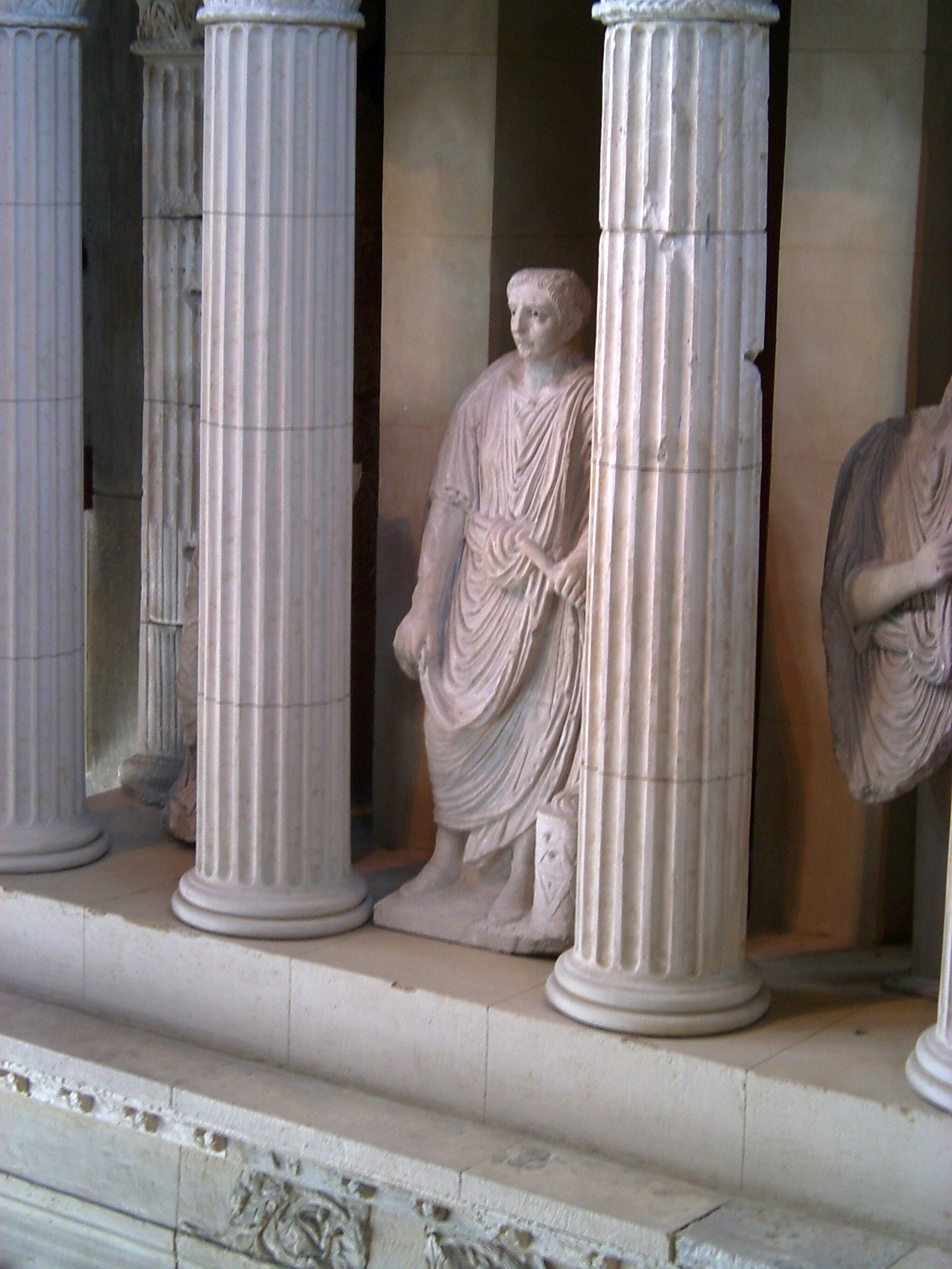 Statue im Grabmal des Poblicius - For other images, see gallery Römisch-Germanisches Museum.